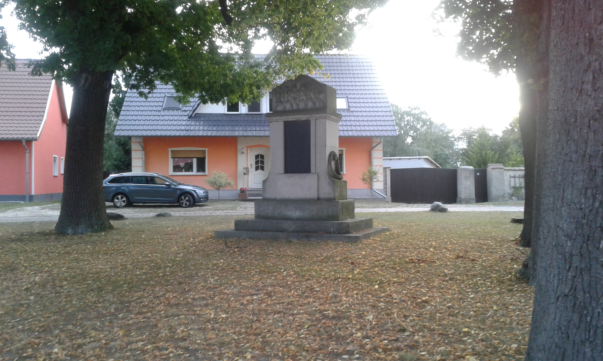 Kriegerdenkmal